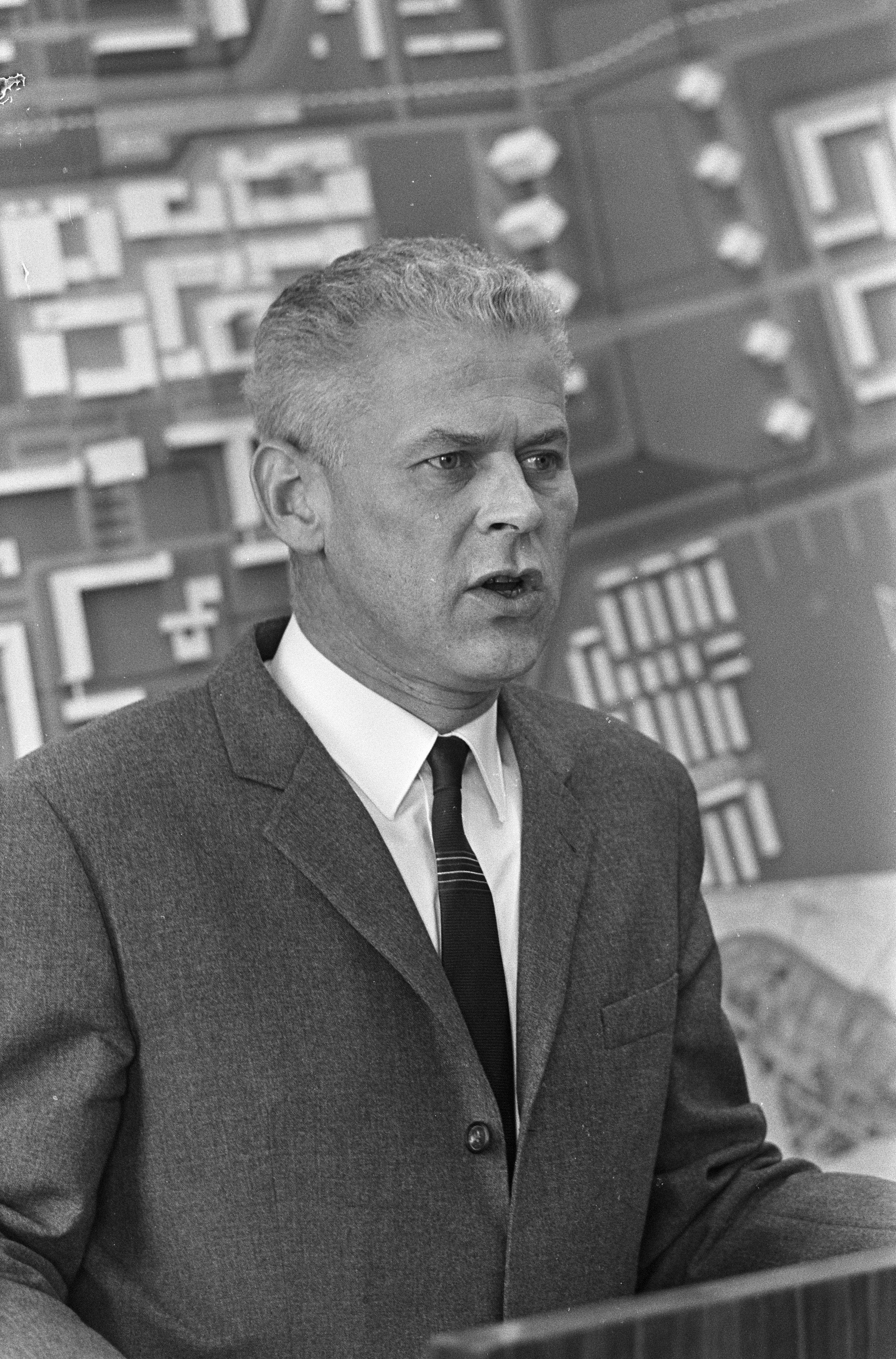 Collectie / Archief : Fotocollectie Anefo Reportage / Serie : [ onbekend ] Beschrijving : Amsterdam-Noord. Wethouder Volkshuisvesting mr. Elsenburg hield conferentie. Nummers 22.23 Wethouder Elsenburg Datum : 26 oktober 1967 Locatie : Amsterdam, Noord-Holland Trefwoorden : conferenties, wethouders Fotograaf : Kroon, Ron / Anefo Auteursrechthebbende : Nationaal Archief Materiaalsoort : Negatief (zwart/wit) Nummer archiefinventaris : bekijk toegang 2.24.01.05 Bestanddeelnummer : 920-8139